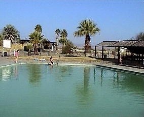 Thermalbad Groß Barmen, Namibia